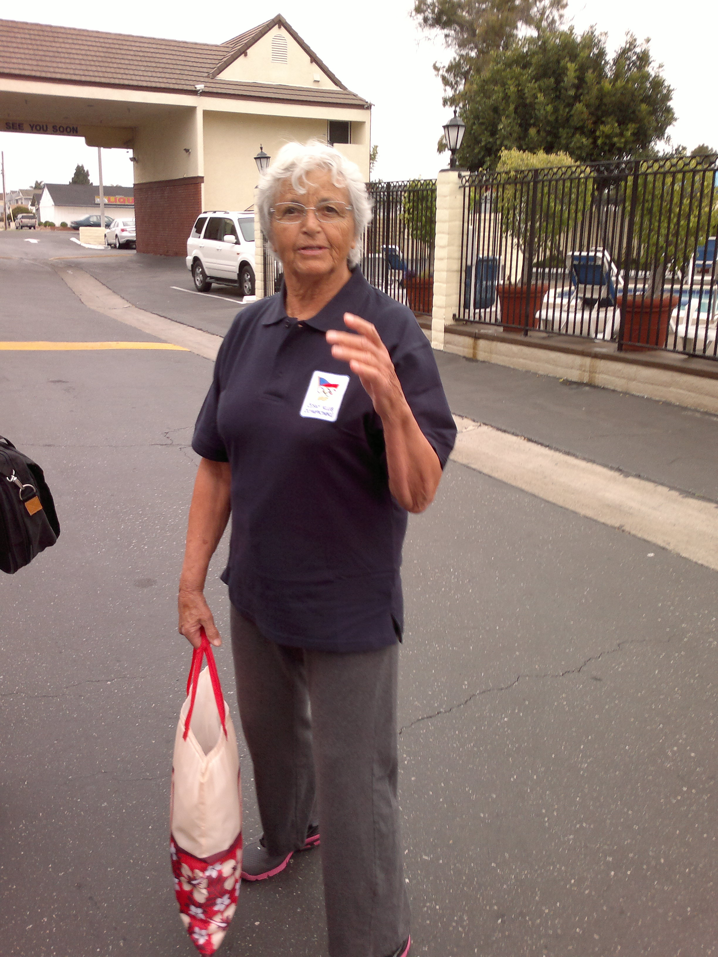 Olga Fikotová - Connoly